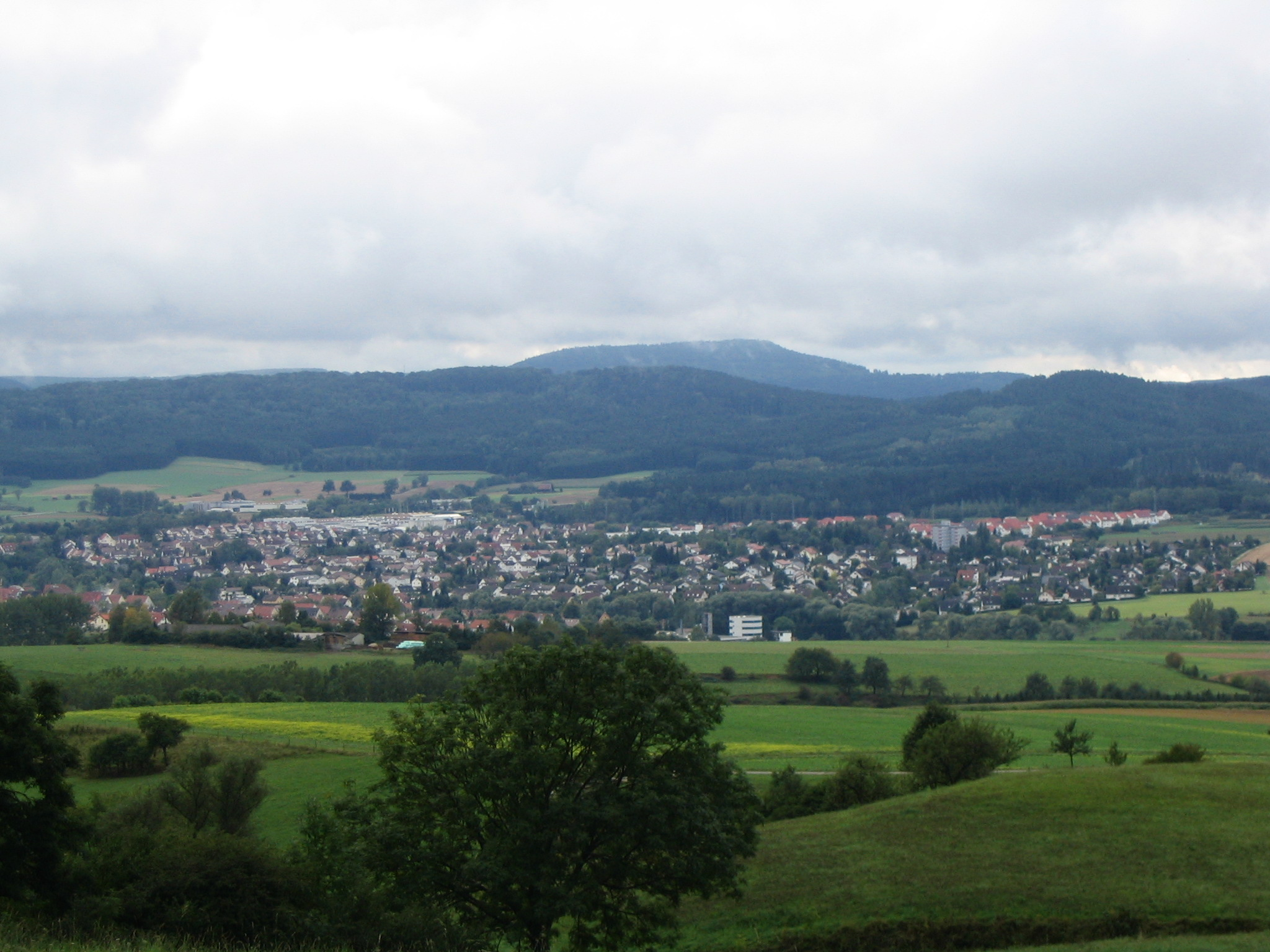 Spaichingen, taken from Klippeneck